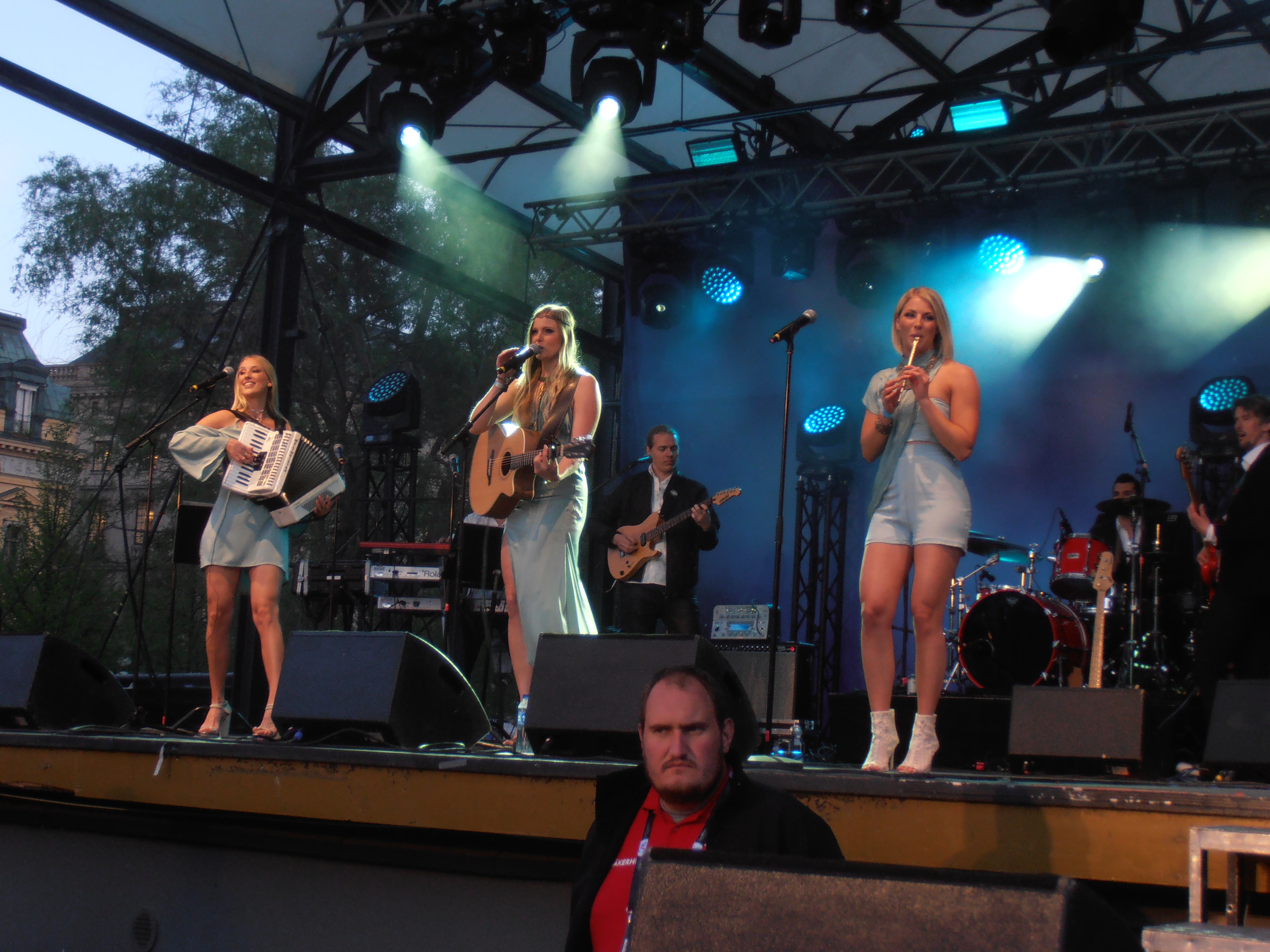 Timoteij - Eurovision Village 2016 - 2